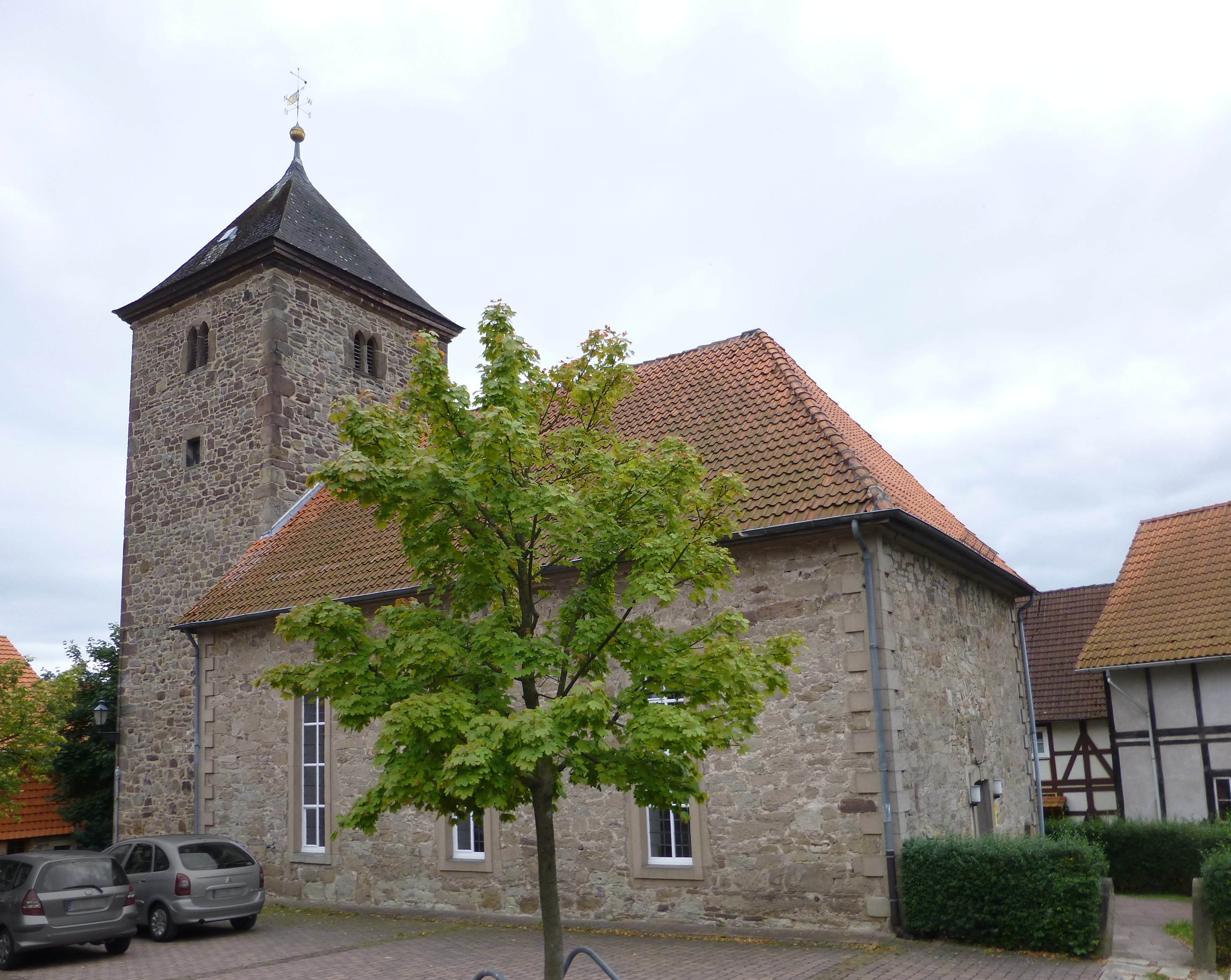 Nordwestansicht der ev.-luth. Kirche in Lippoldshausen, Stadt Hann. Münden, Südniedersachsen. Turm erbaut um 1200, heutiges Kirchenschiff 1753. Lt. Denkmaltopographie St.Michaels-Patrozinium. Im Inneren barocke Kanzelaltarwand und spätbarocke Orgel von St. Heeren, im kreuzgratgewölbten Turmuntergeschoss gotische Fresken.